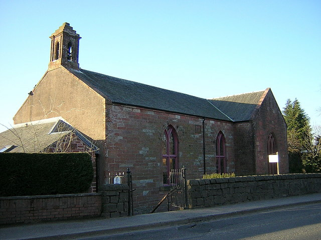 Buchlyvie Parish Church